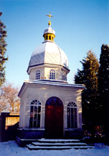 Каплиця у м.Олесько. 1891 р., архітектор В. Нагірний (1848—1921)